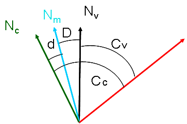 relations entre cap compas, cap magnétique et cap vrai